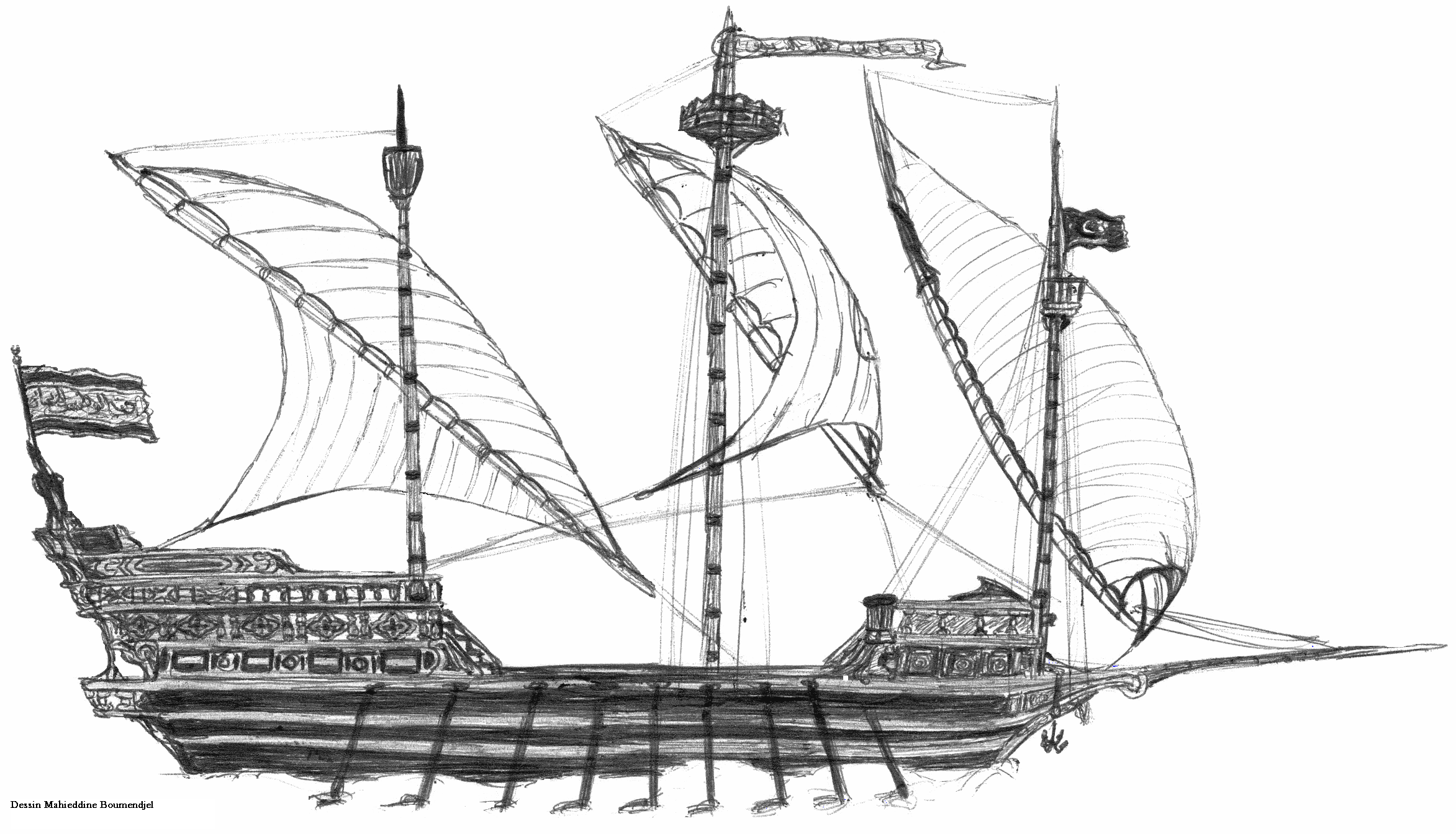 Bateau de l'armada navale algérienne au XVIème siècle sous le commandement de Baba Aaroudj vers 1530.